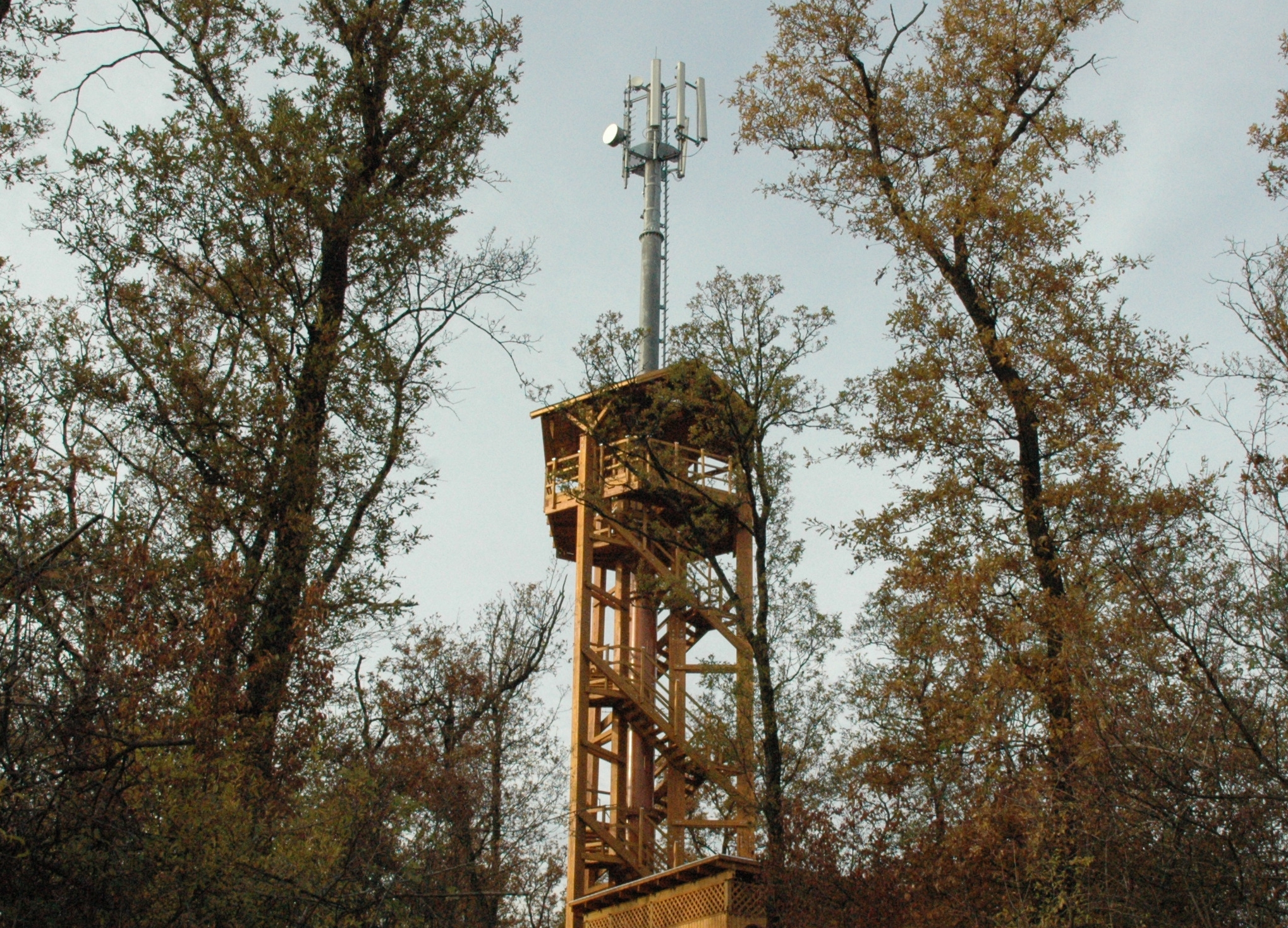 A Major-tetői kilátótorony Szarvaskőn. A hegy tengerszint feletti magassága 369 méter. A kilátó 30 méter magas.